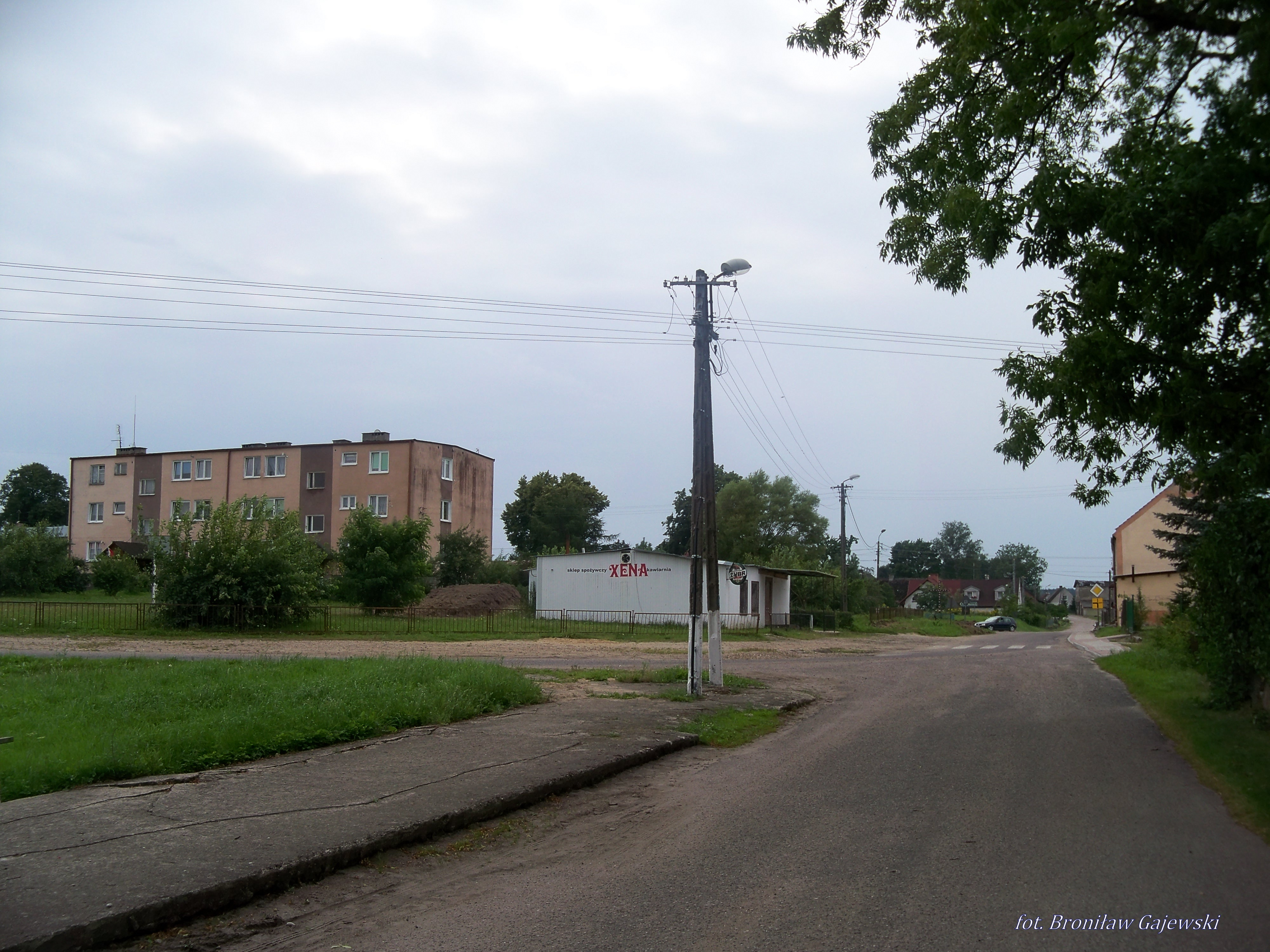 widok wsi.